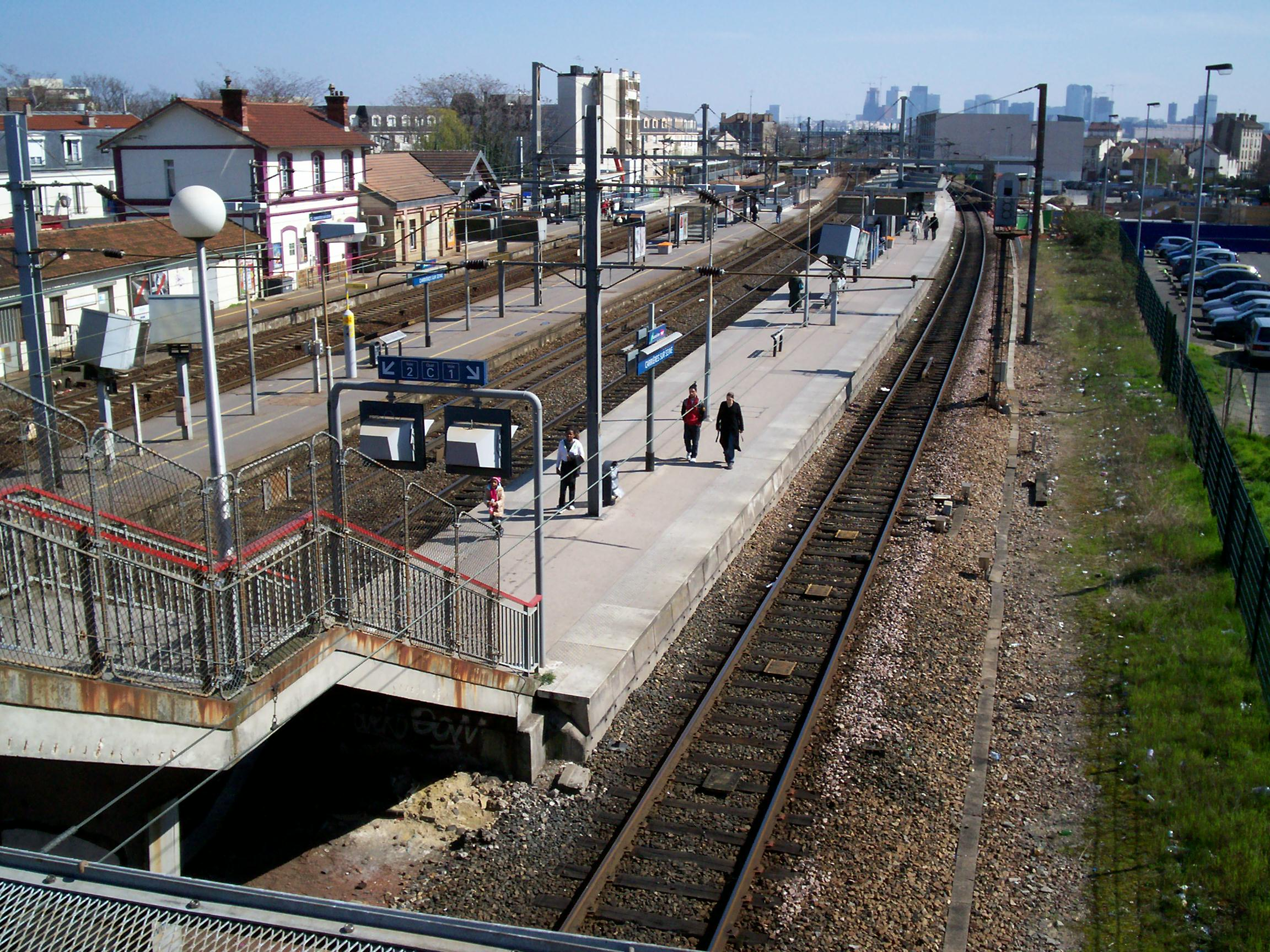 Gare de Houilles